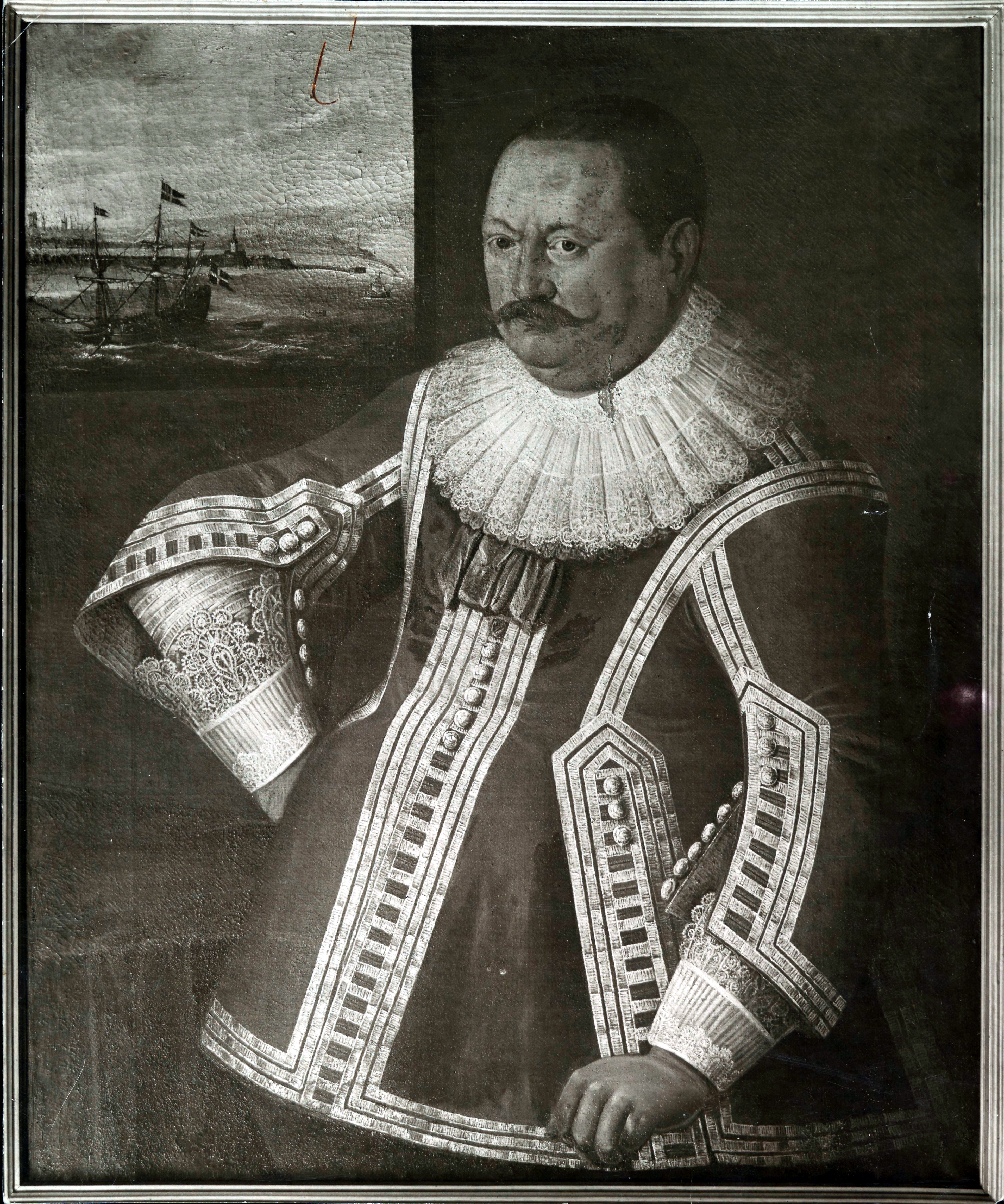 Arend Dickmann (admirał polskiej floty wojennej) - fotografia obrazu nieznanego autorstwa z XVII w.